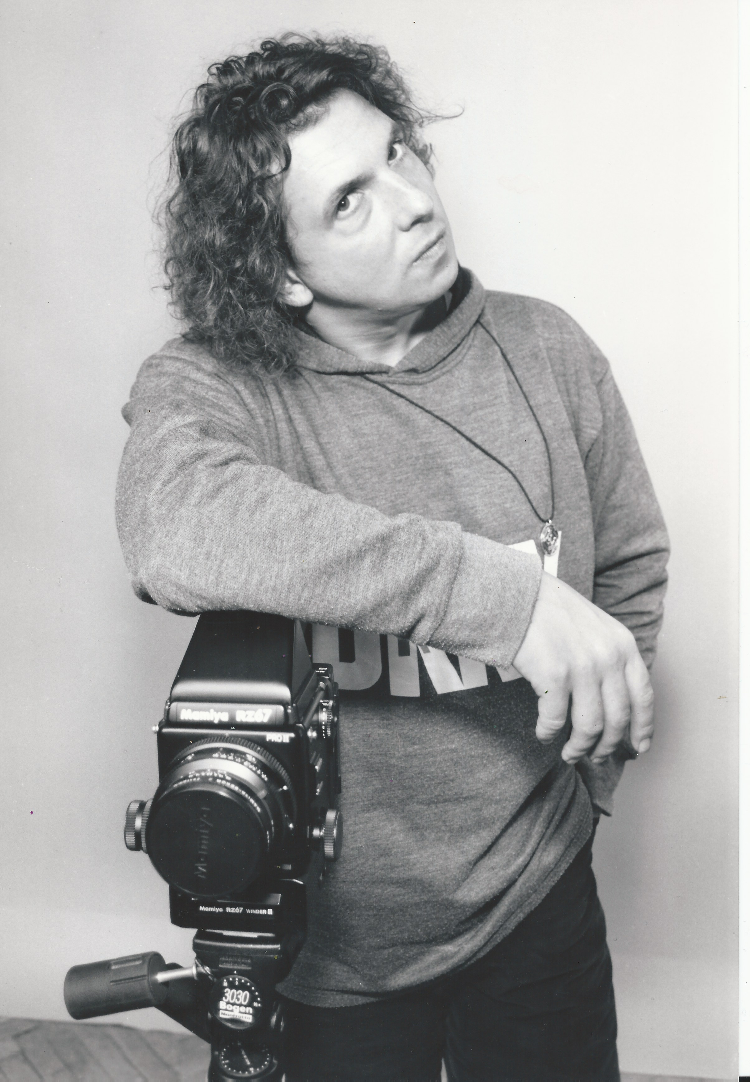 Сергей Берменьев 2001